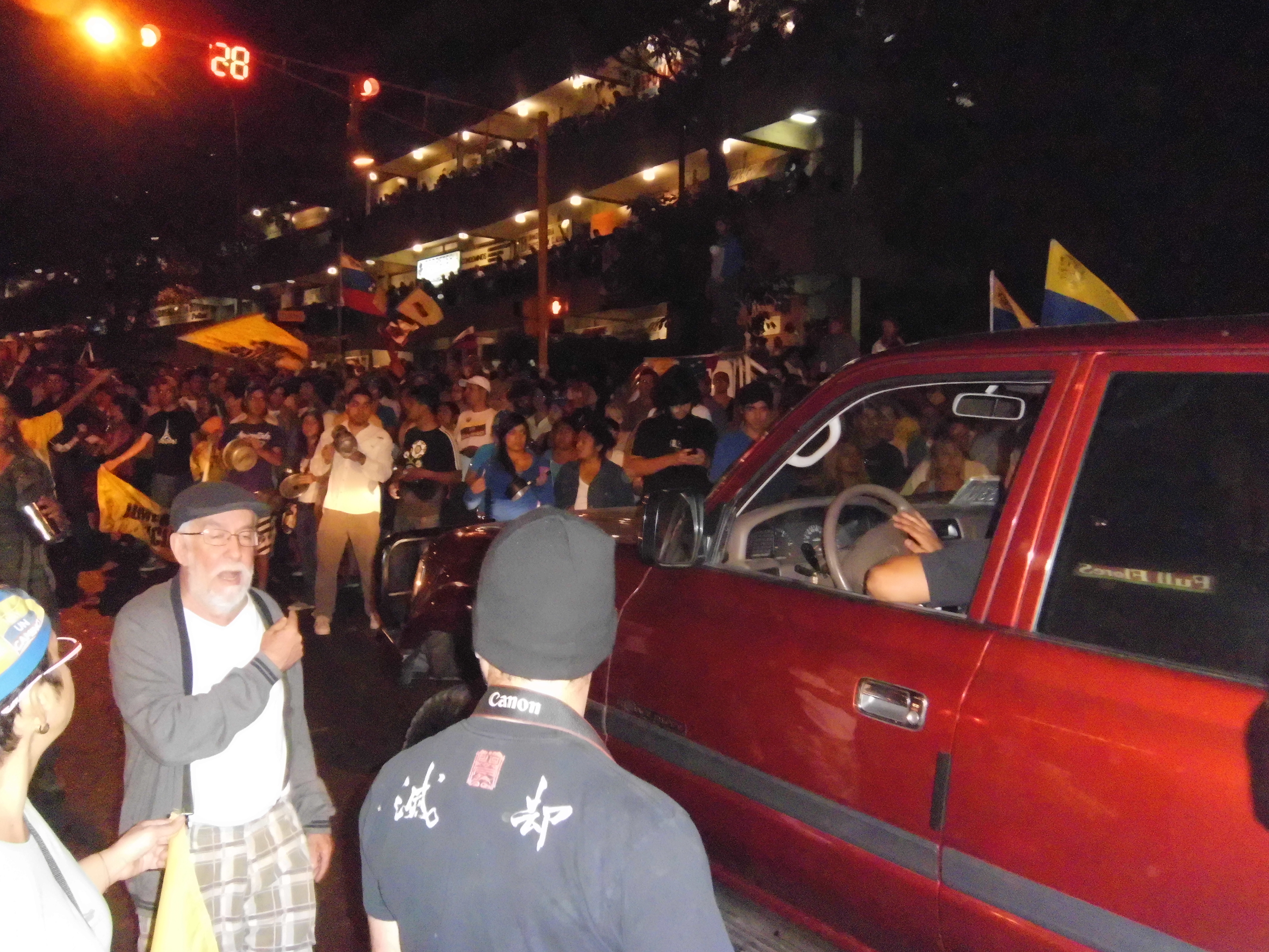 Cacerolazo contra Nicolás Maduro - La Boyera Municipio el Hatillo, Estado Miranda Venezuela día 15 de abril de 2013 hora 8:30 a 9:30 pm